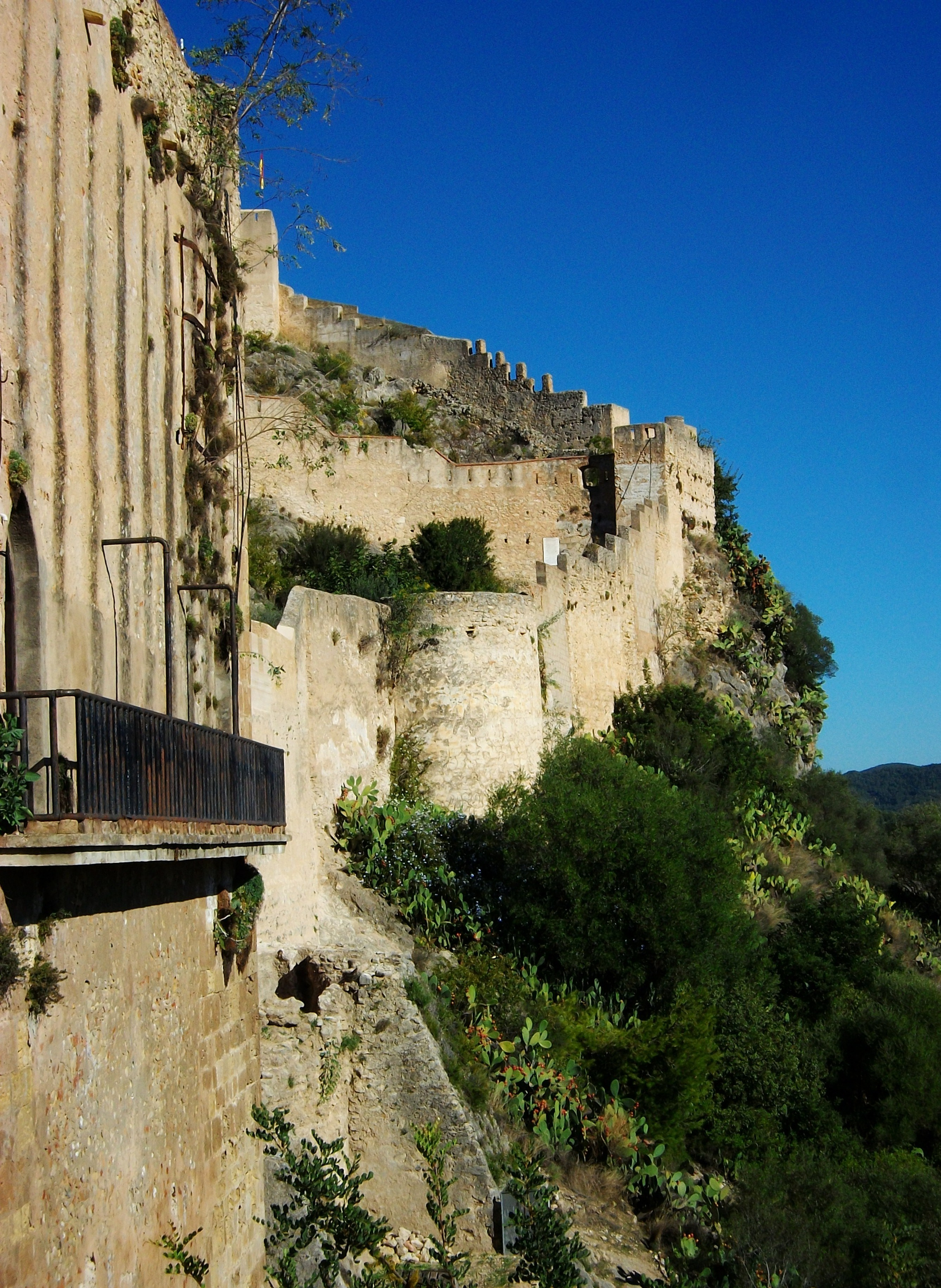 Castell de Xàtiva des de l'exterior de la porta del Socors o de Bixquert.